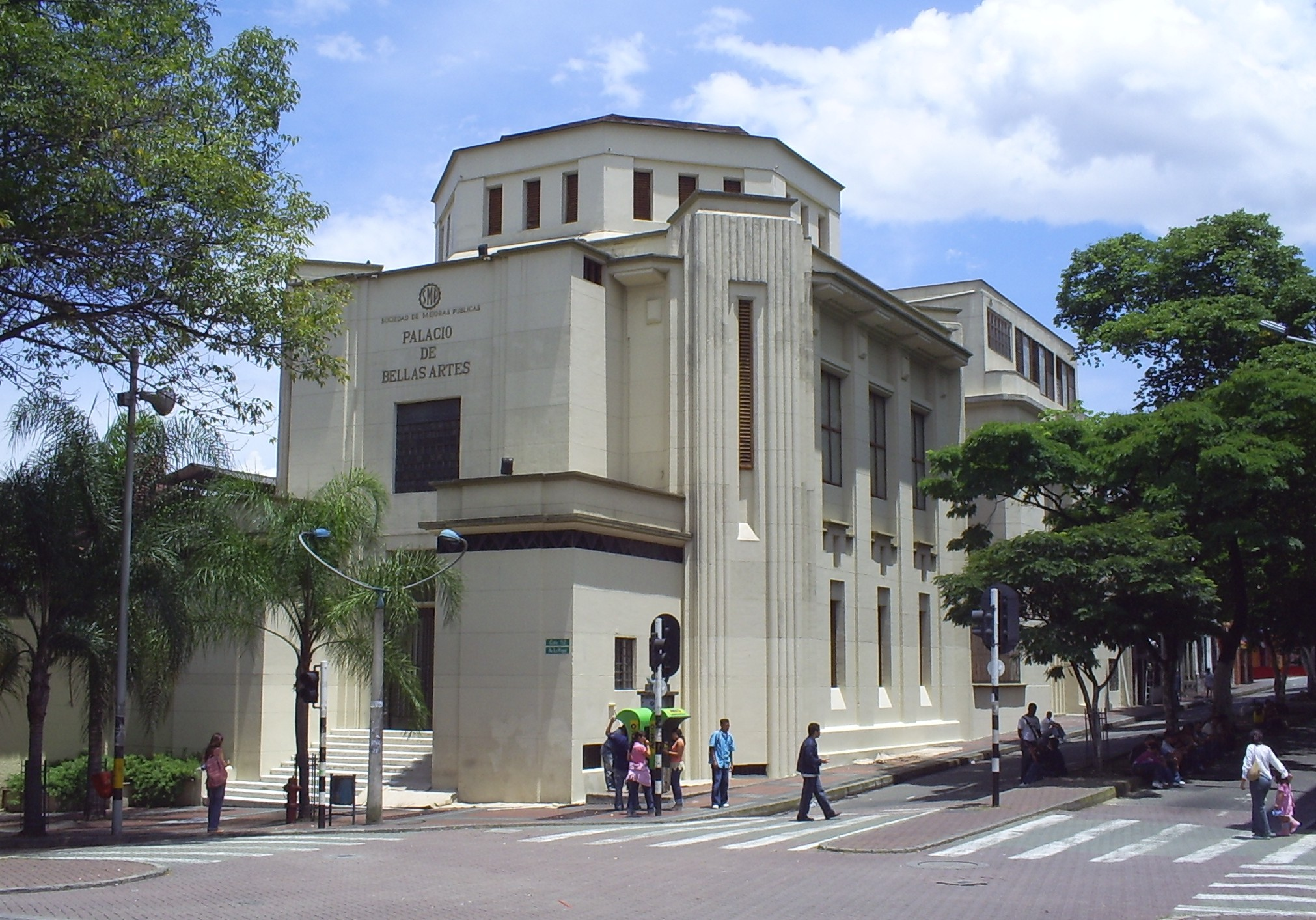 Palacio de Bellas Artes, Medellín, Colombia.